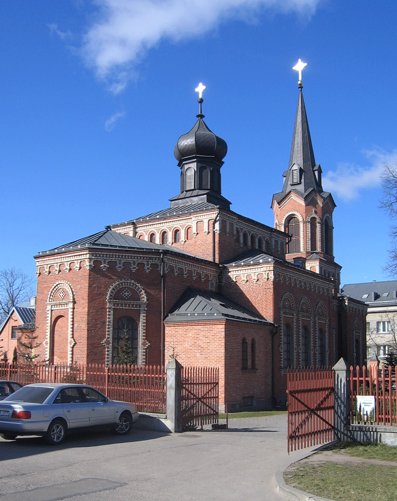 Marijampoles Šv. Vincento Pauliečio bažnyčia